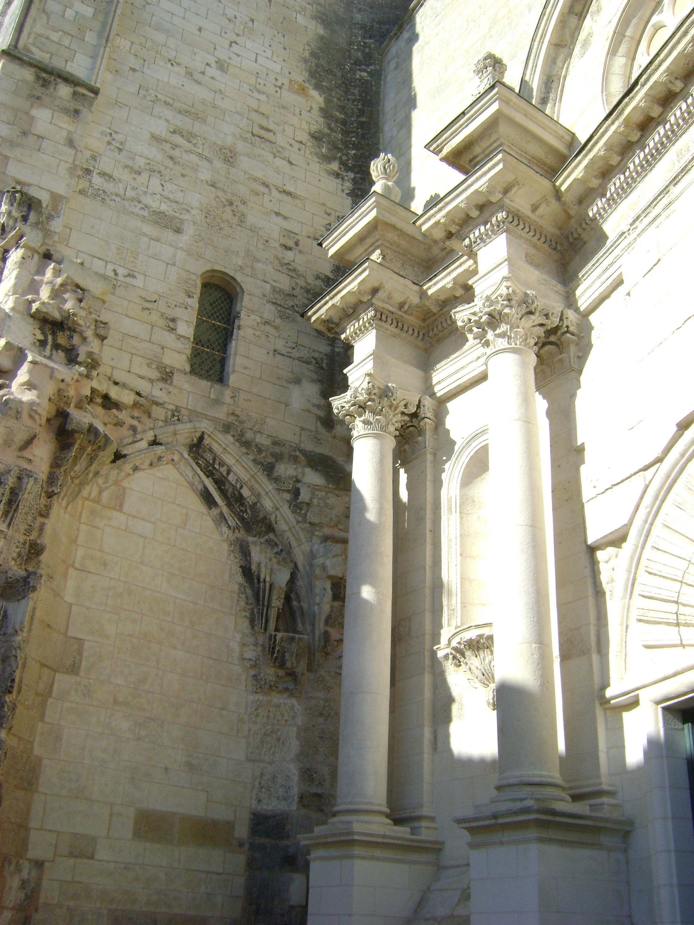 Eglise Saint-Sauveur de la Rochelle.